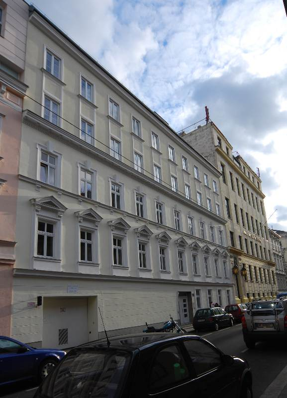 Die beiden Gebäude des ehemaligen Kaiser Franz Joseph-Ambulatorium und Jubiläumsspital in der Sandwirtgasse 3 – 5 in Wien-Mariahilf